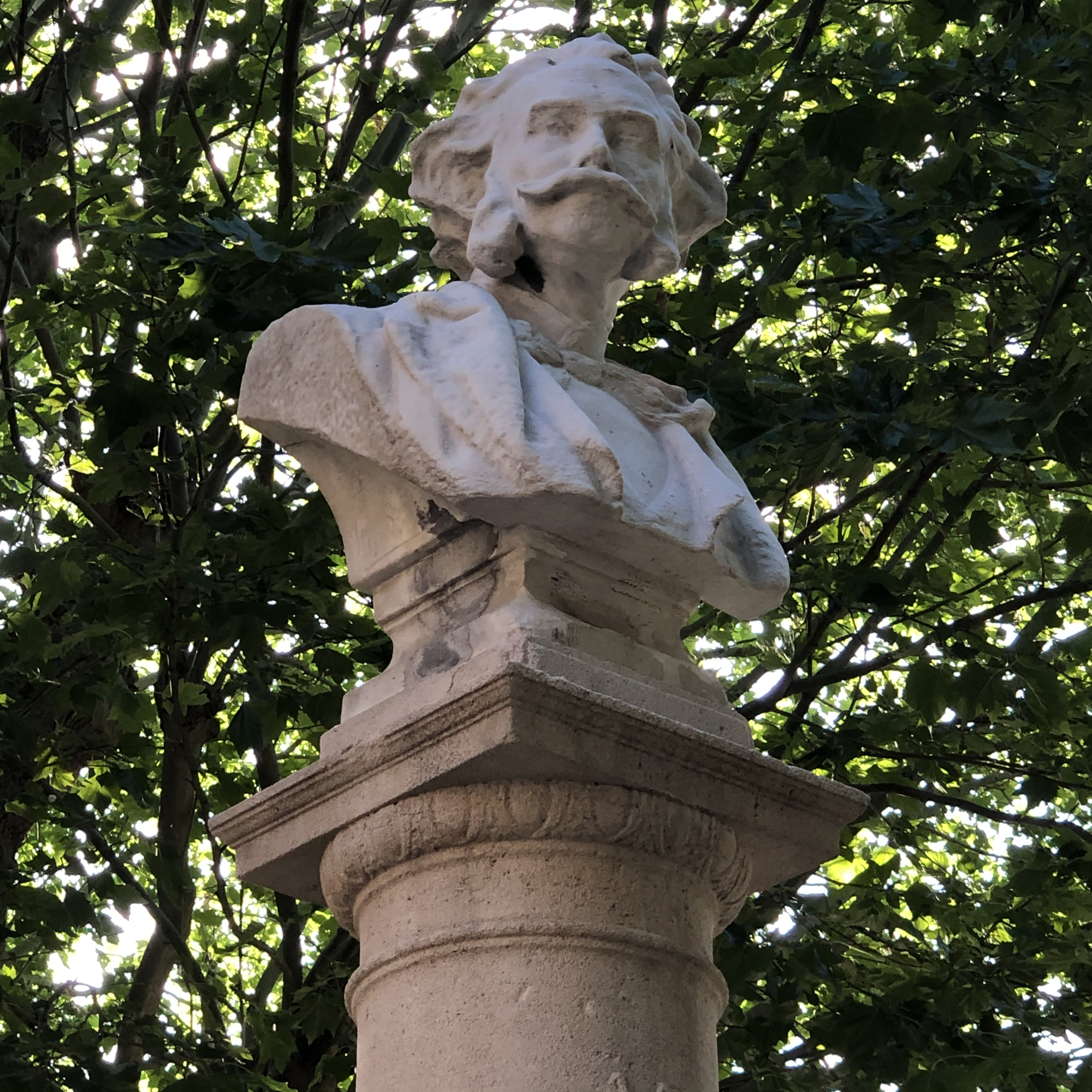 Standbeeld van Karel Wiry op het Casinoplein te Gent.